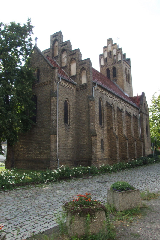 Dorfkirche in Berlin-Marzahn Fotograf: Harald Rossa Datum: August 2006 Höher aufgelöste Version ist verfügbar